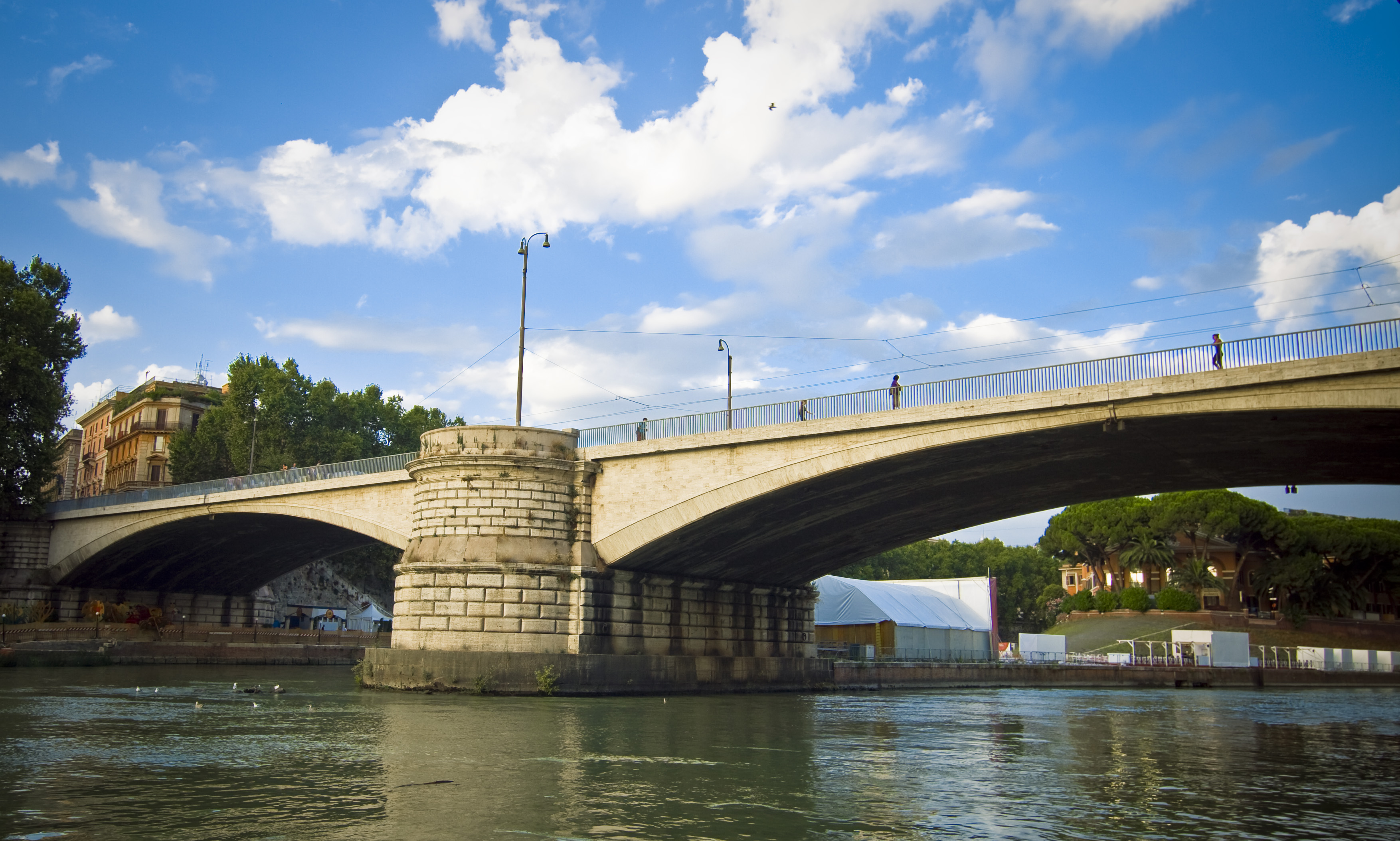 Ponte Garibaldi (Rome)